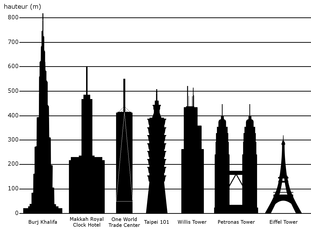 Comparaison à jour des gratte-ciels mis 11/05/2013